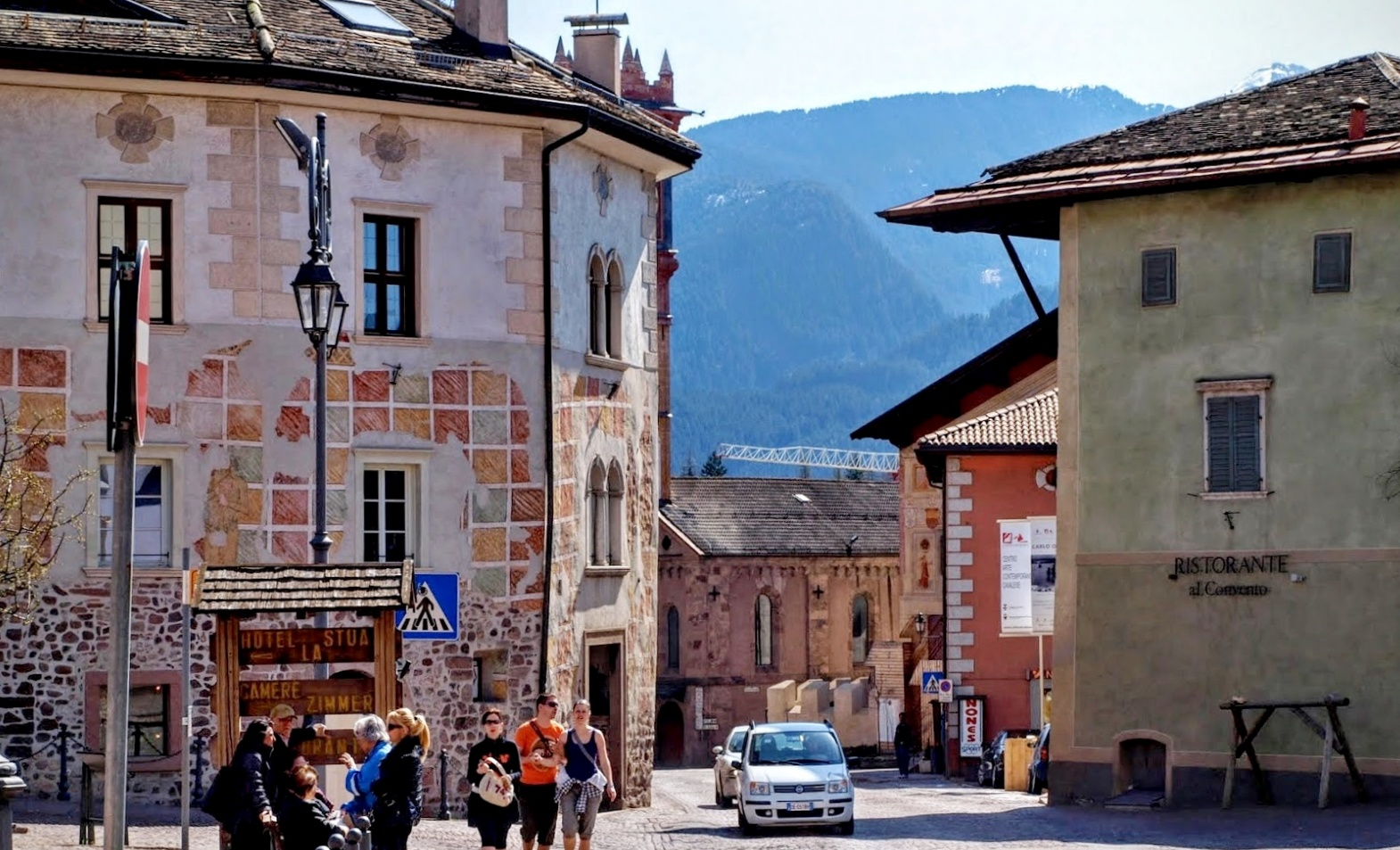 Cavalese